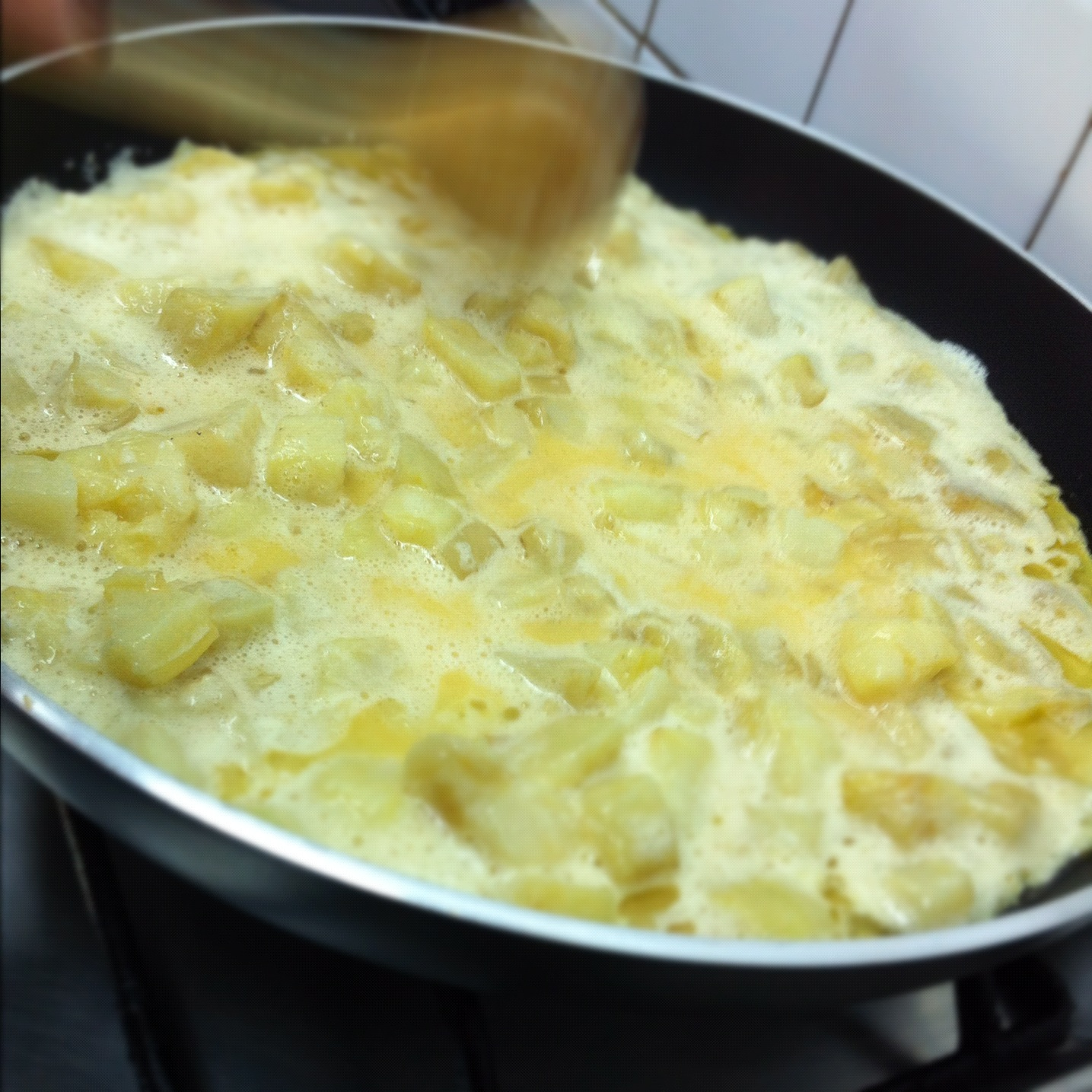 Cocinando una tortilla española. Foto tomada con iPhone4